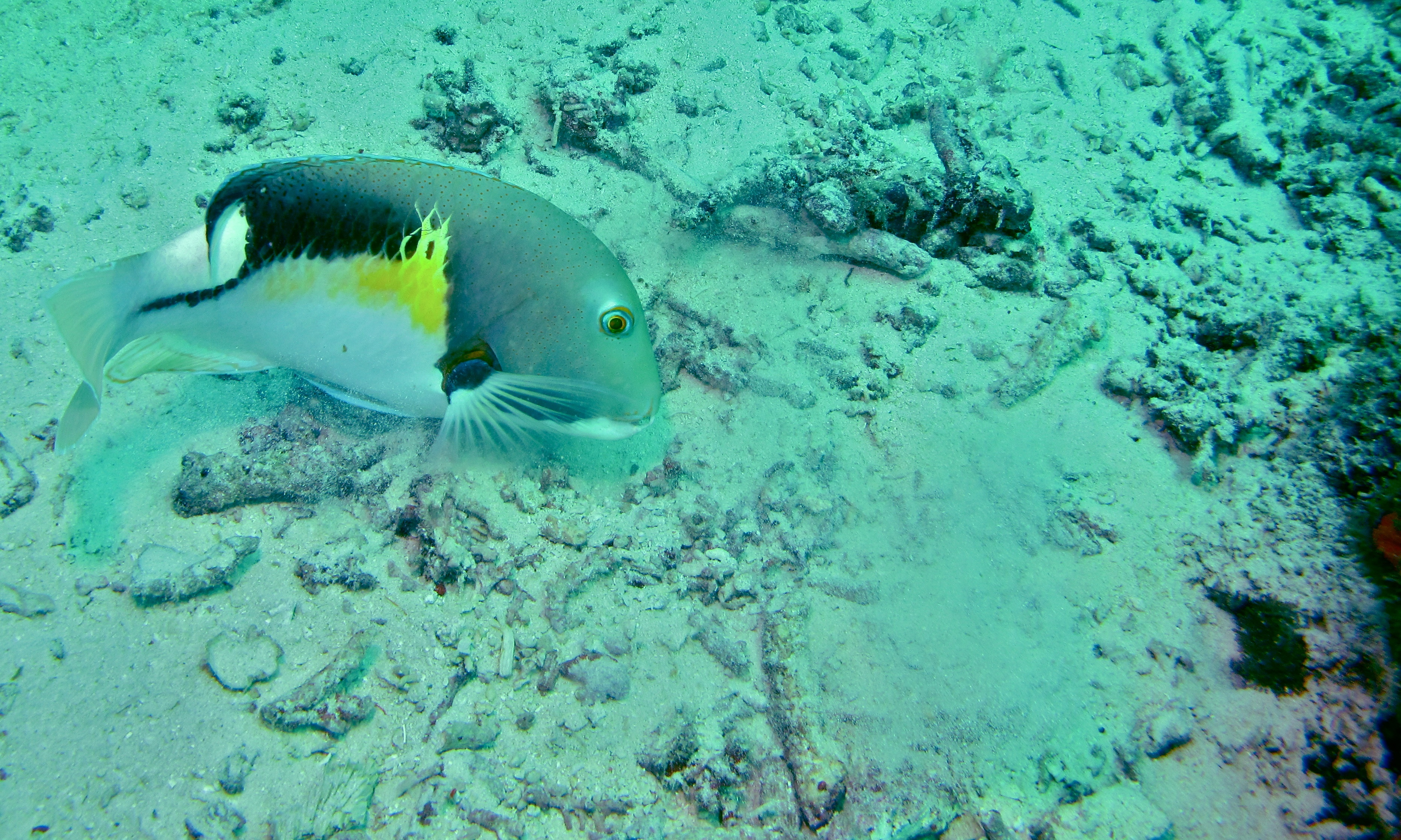 Left Shoulder, Pulau Sibuan, Sabah, MALAYSIA